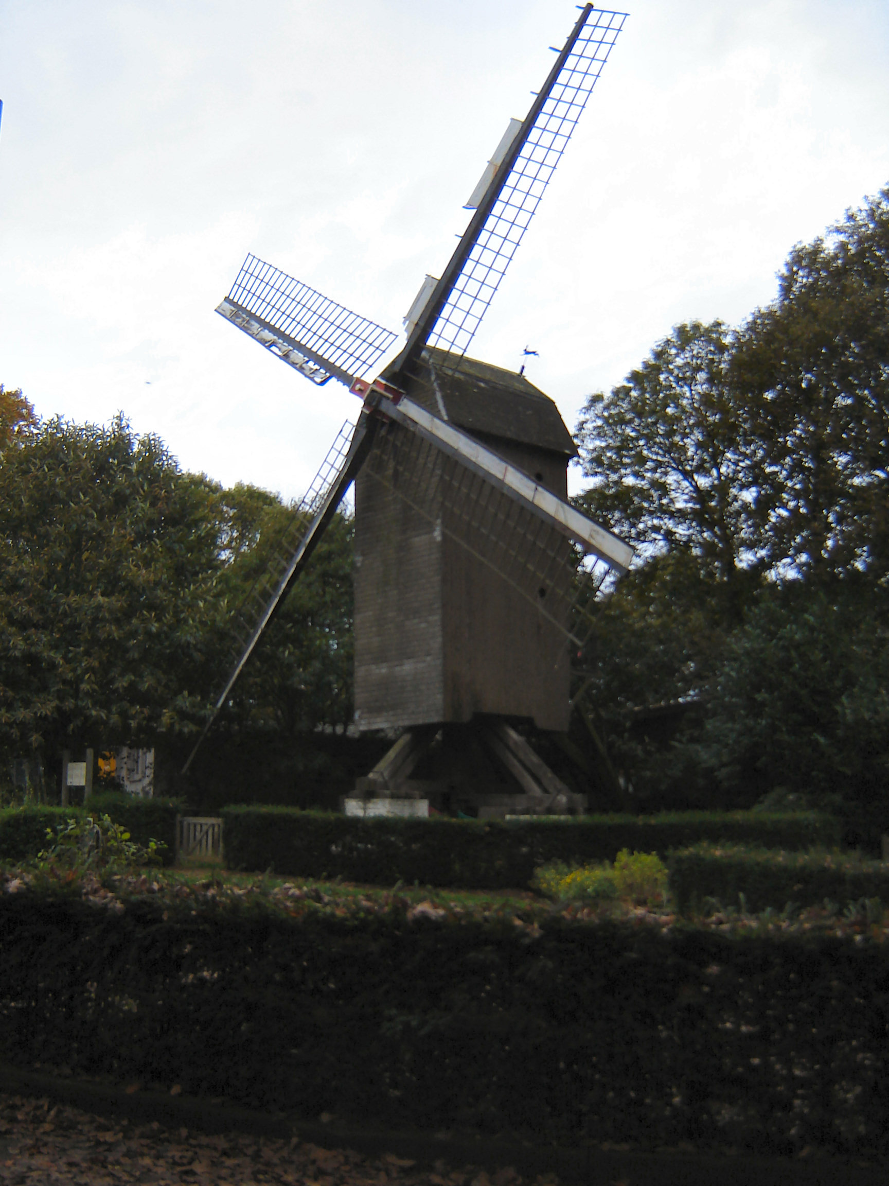 Lijstermolen windmill on the Rodeberg in Westouter, Heuvelland, West-Flanders, Belgium